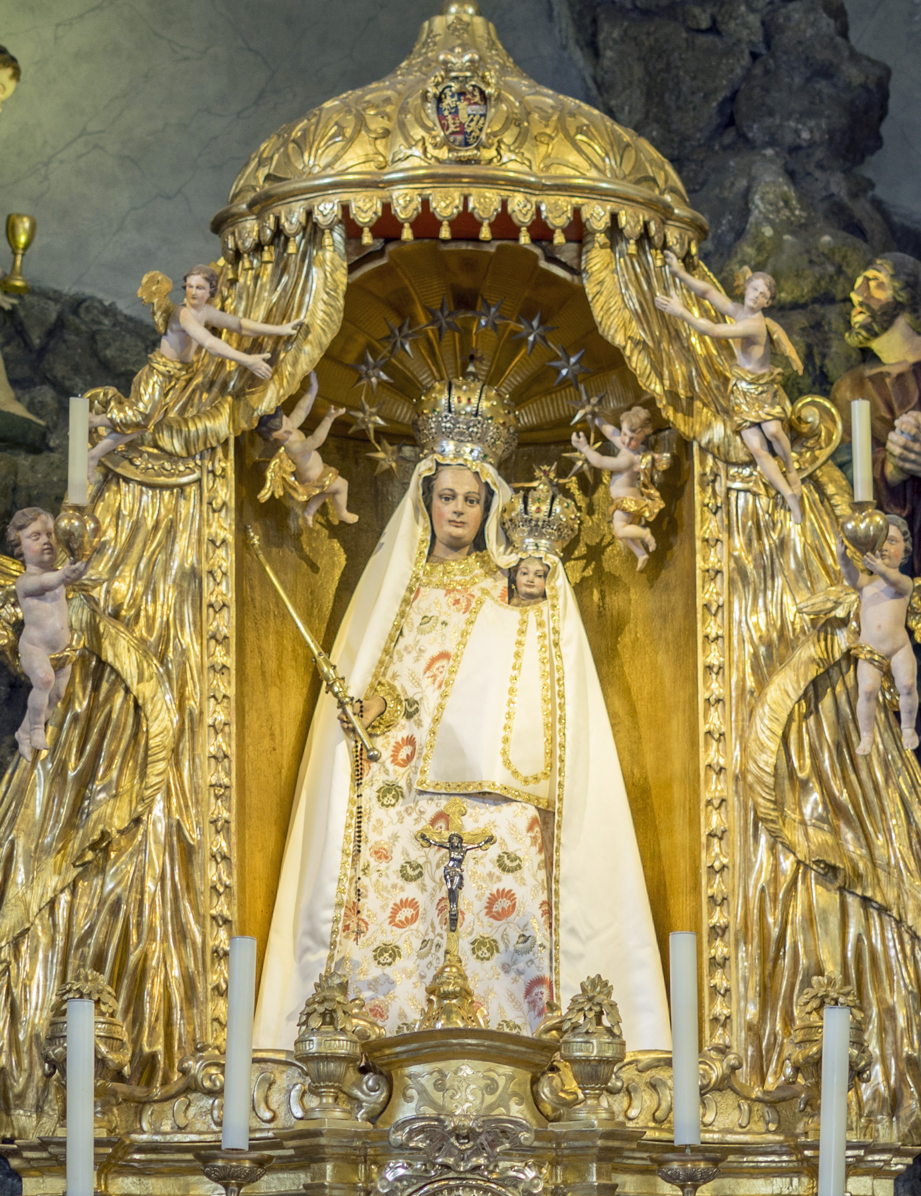 Kalvarienberg, Eisenstadt Marienstatue in der Gnadenkapelle. Fürst Paul I. ließ das 1690 nach dem Vorbild von Maria Einsiedeln vom Eisenstädter Bildhauer Michael Felser († 1710) geschaffene Gnadenbild aus Großhöflein überführen und die Kapelle entsprechend umgestalten